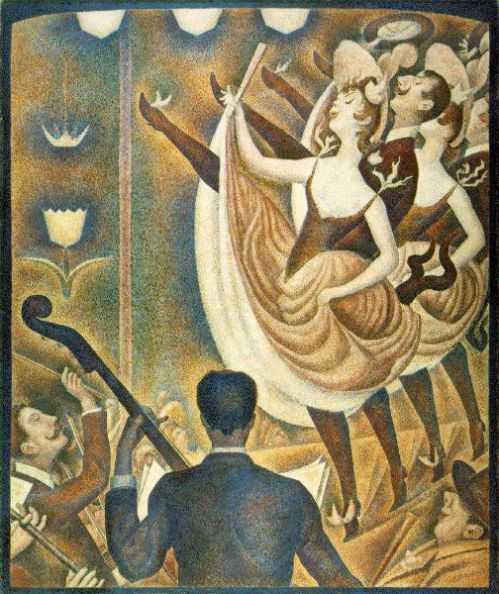 Le Chahut